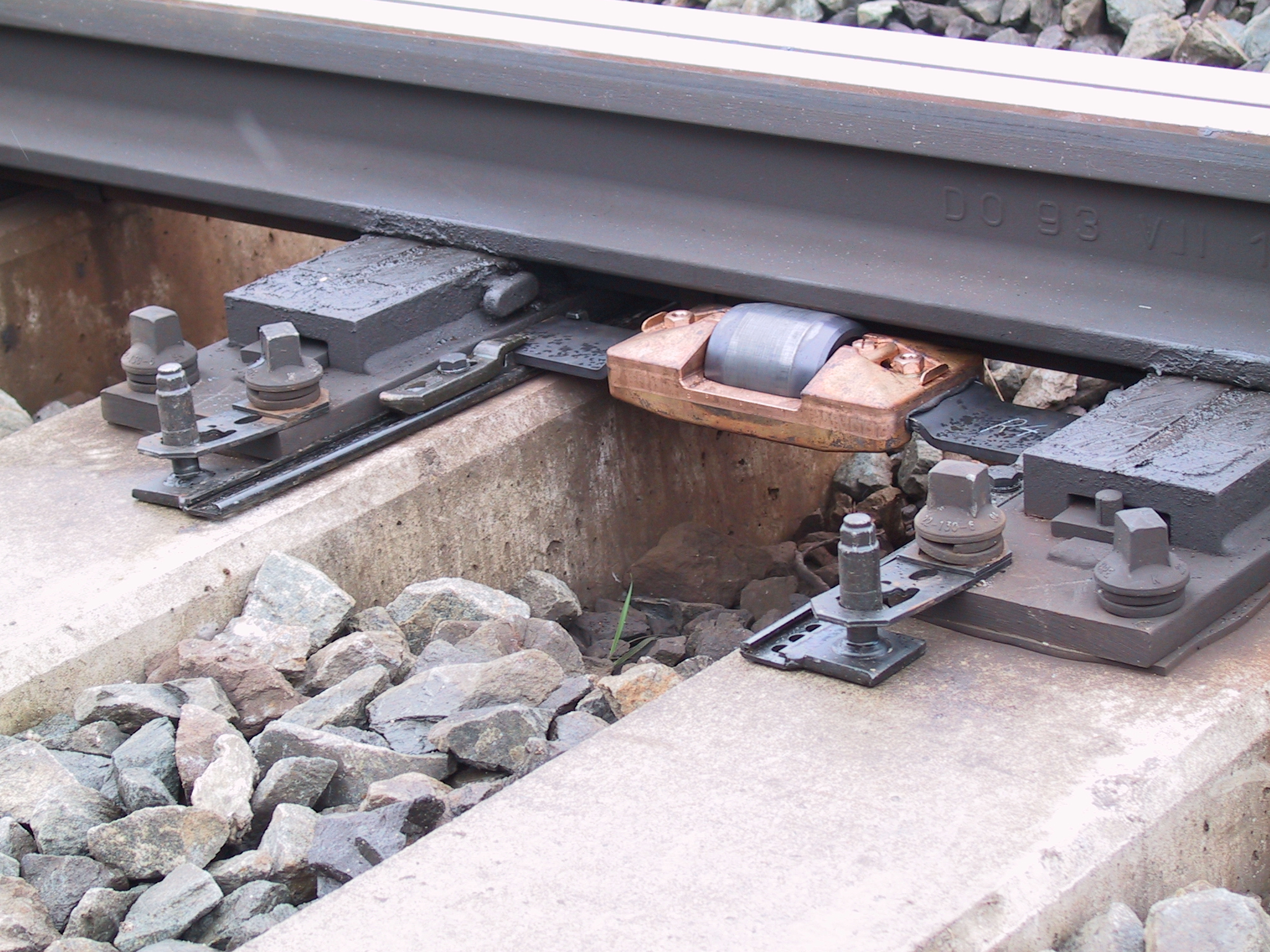 Zungenrollvorrichtung, Einfachrolle Bauart »Austroroll« (im Schwellenfach eingebaut).